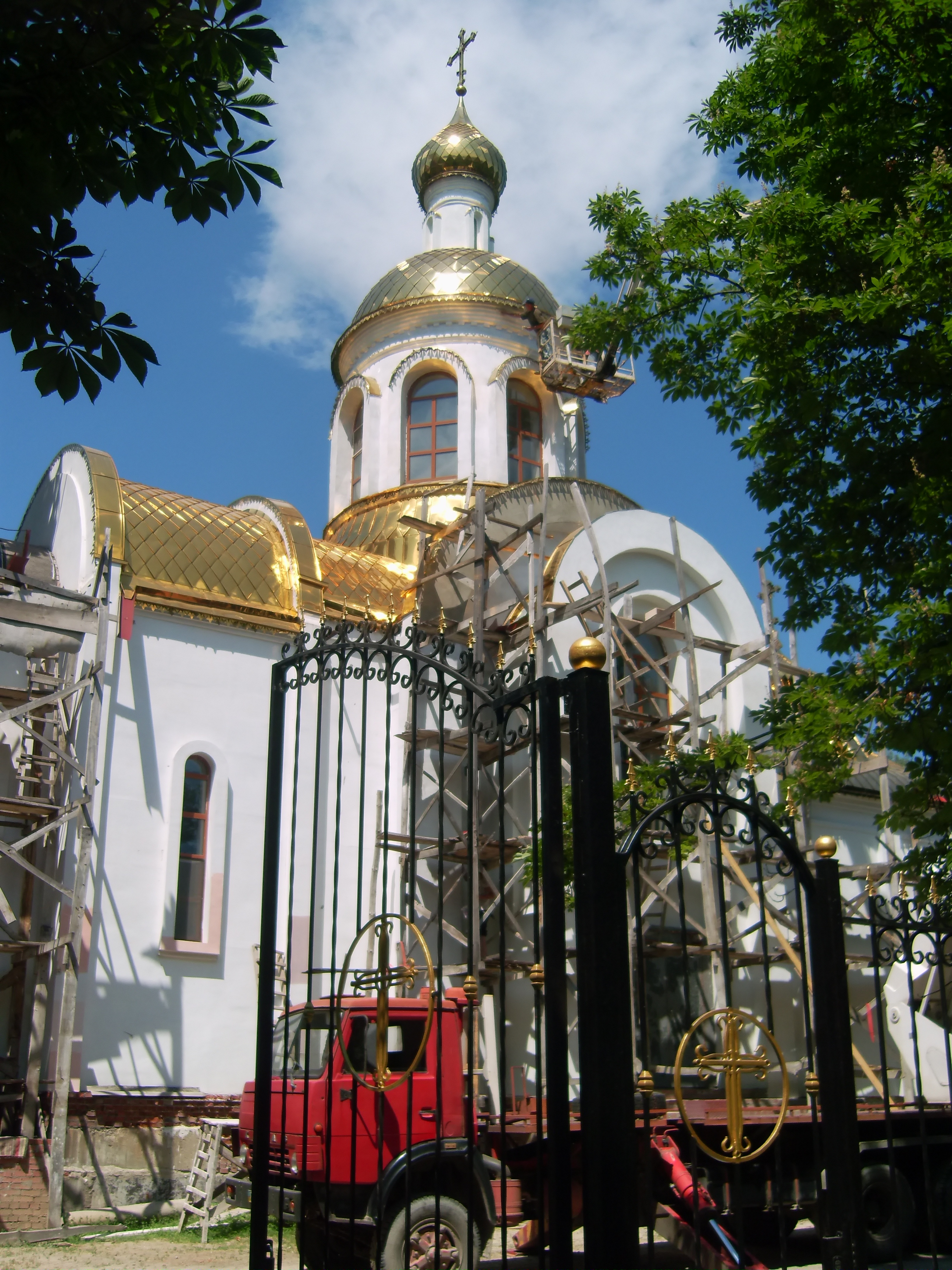 Slovyansk, Donetsk Oblast, Ukraine, 84122